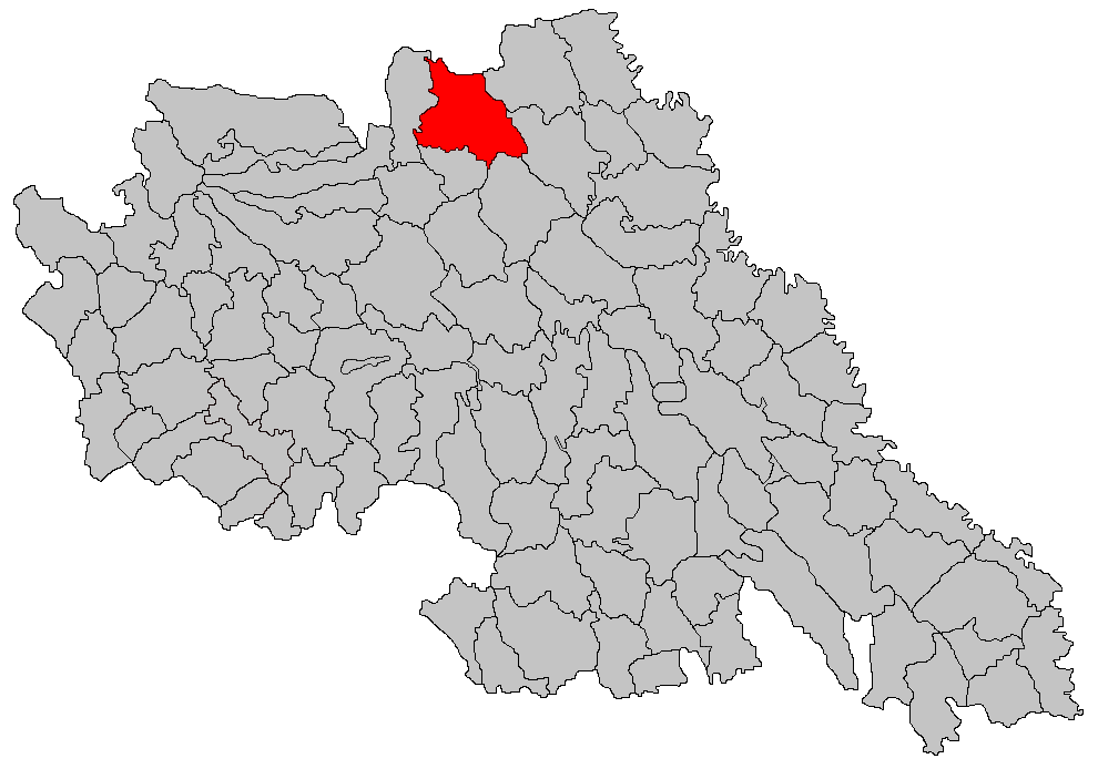 Categorie:Hărţi ale judeţului Iaşi